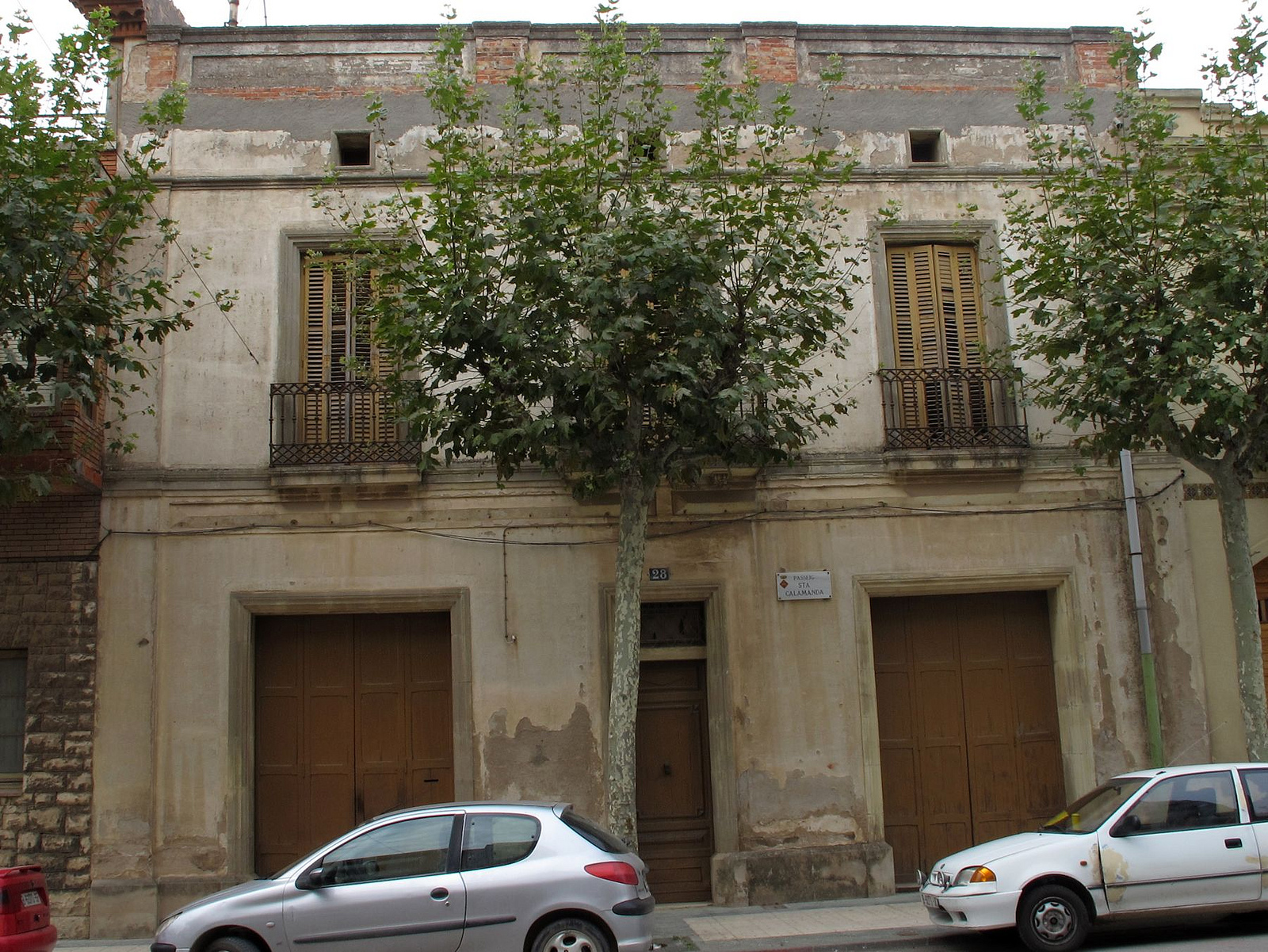 Casa al passeig de Santa Calamanda (Calaf)